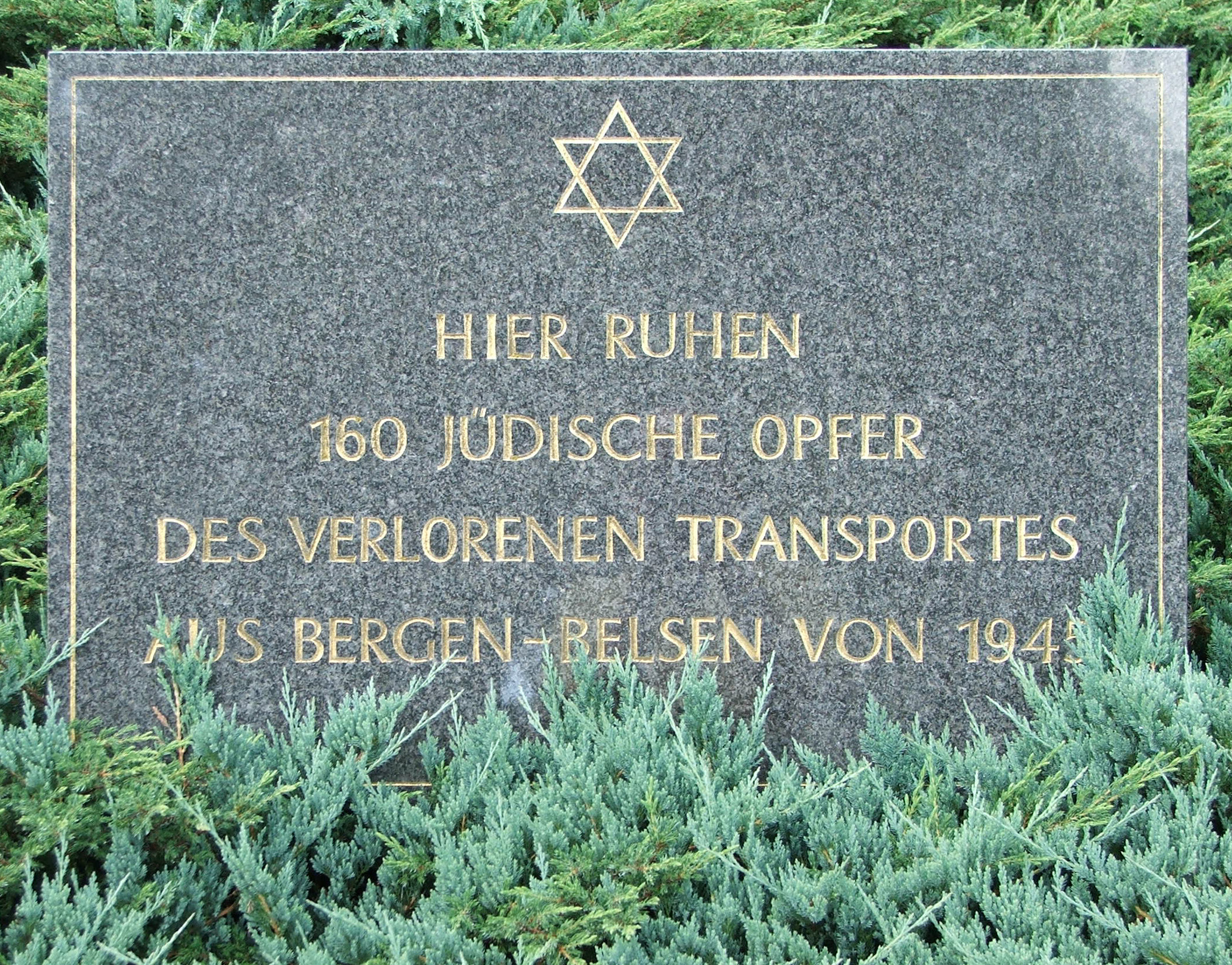 Teil des Denkmales in Tröbitz